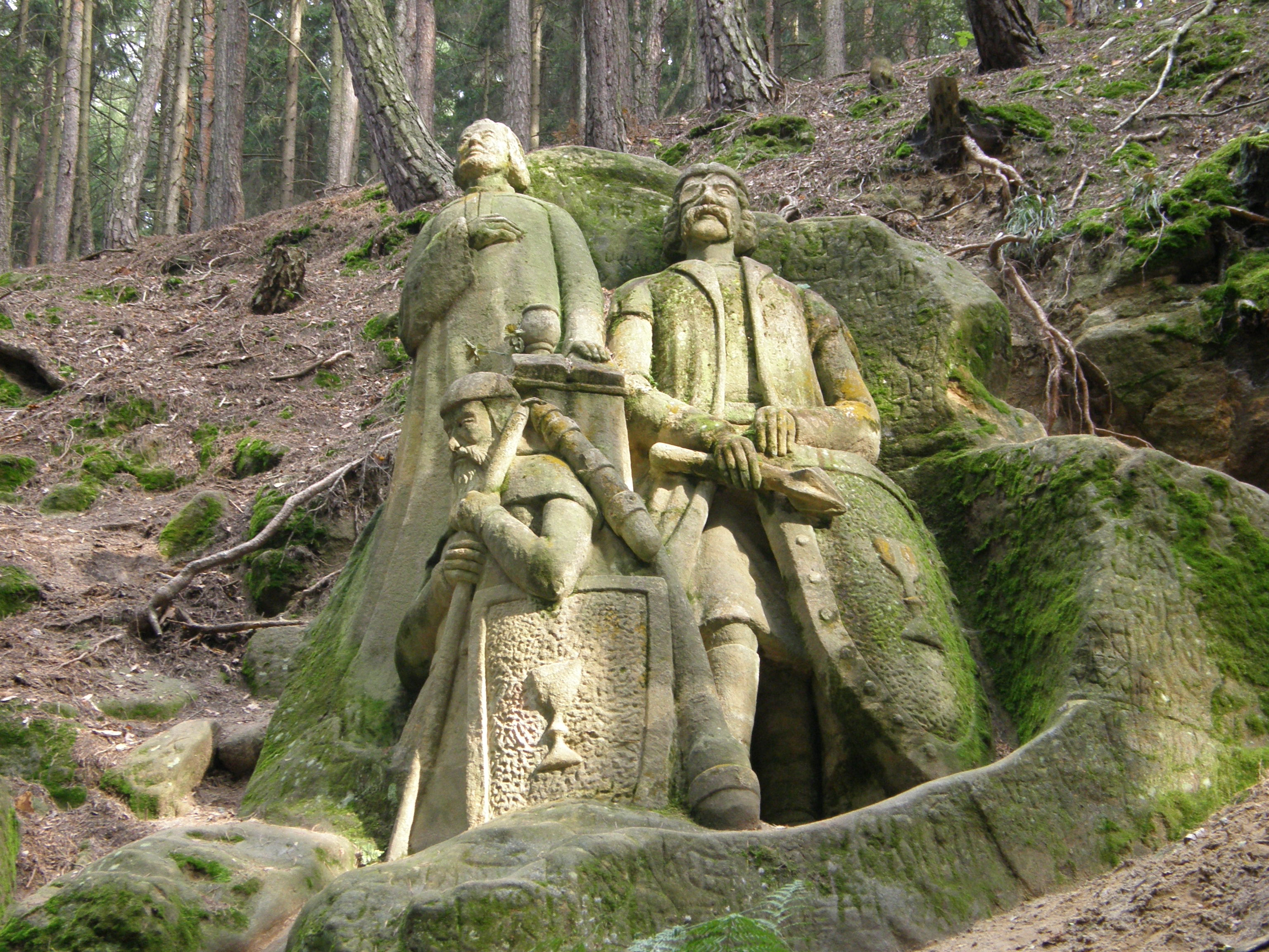 Sousoší - skalní reliefy mistra Jana Husa, Jana Žižky z Trocnova a Prokopa Holého (Bořitov), S svah kopce Velký Chlum, Bořitov